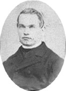 Josef Němeček (1824 - 1912), Český římskokatolický duchovní.